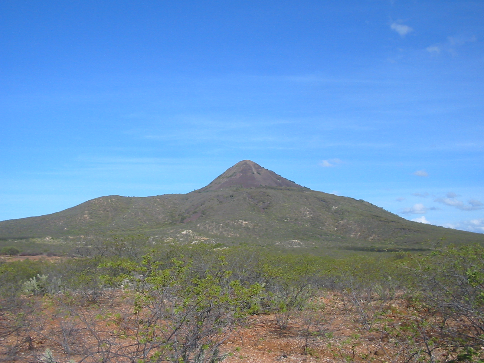 Angicos (Rio Grande do Norte), Brasil. Pico do Cabugi. Cabugi mountain peak. Angicos (Rio Grande do Norte), Brazil.